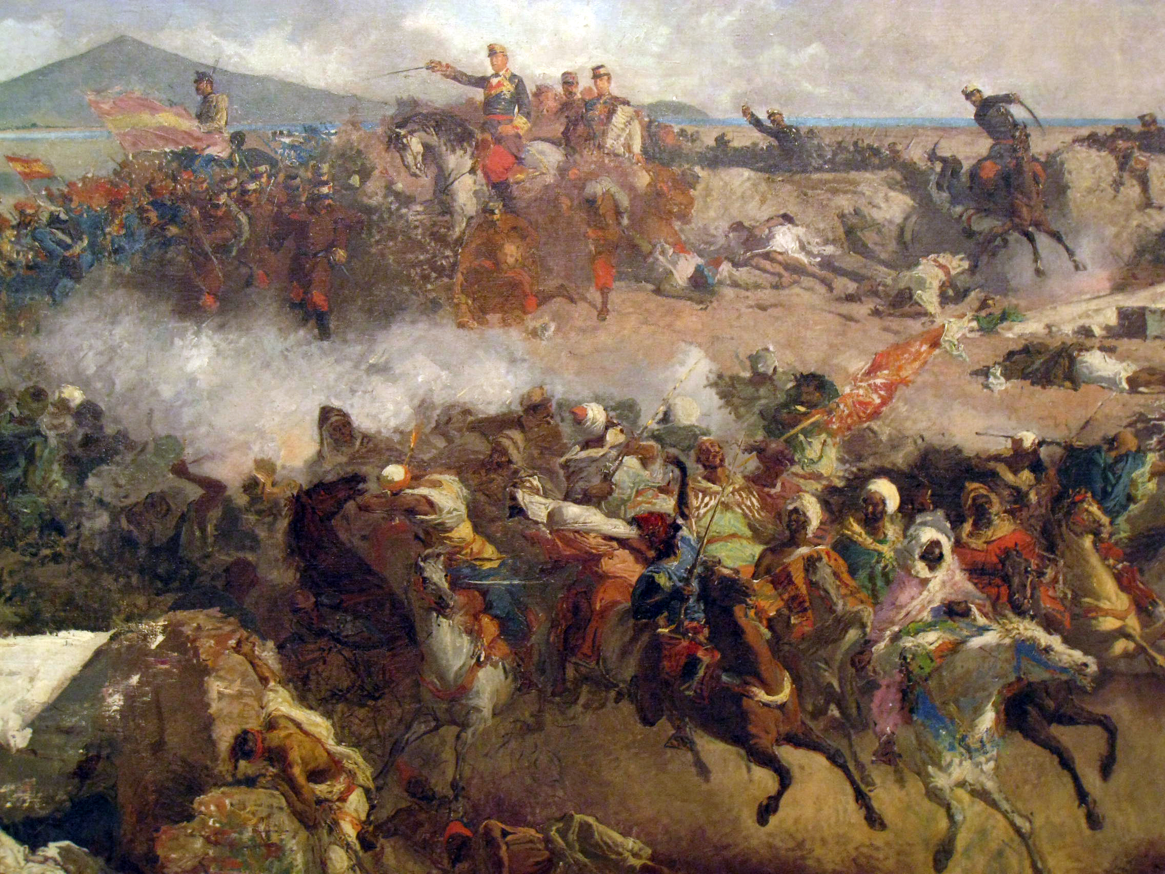 detail